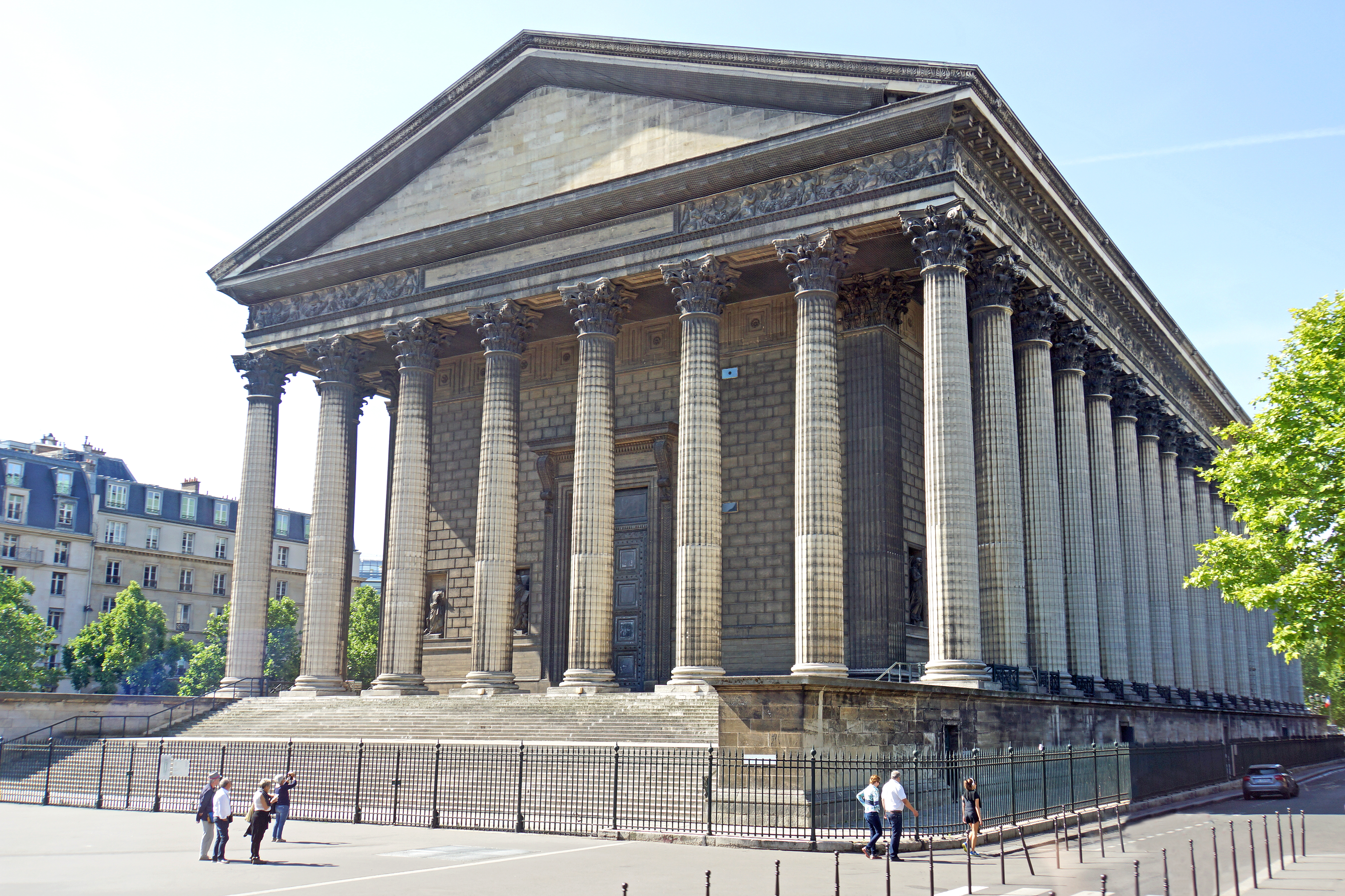 Église de la Madeleine, Paris, France.